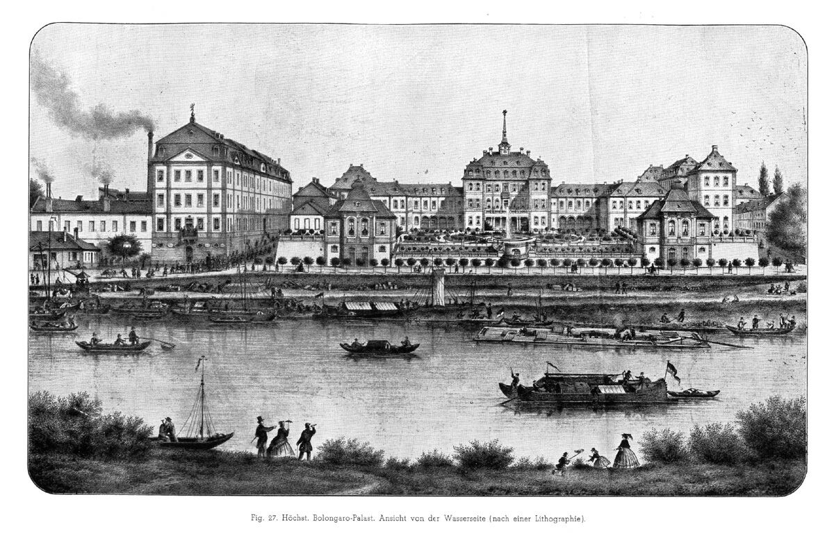 Ansicht des Bolongaro-Palasts in Höchst von der Wasserseite aus